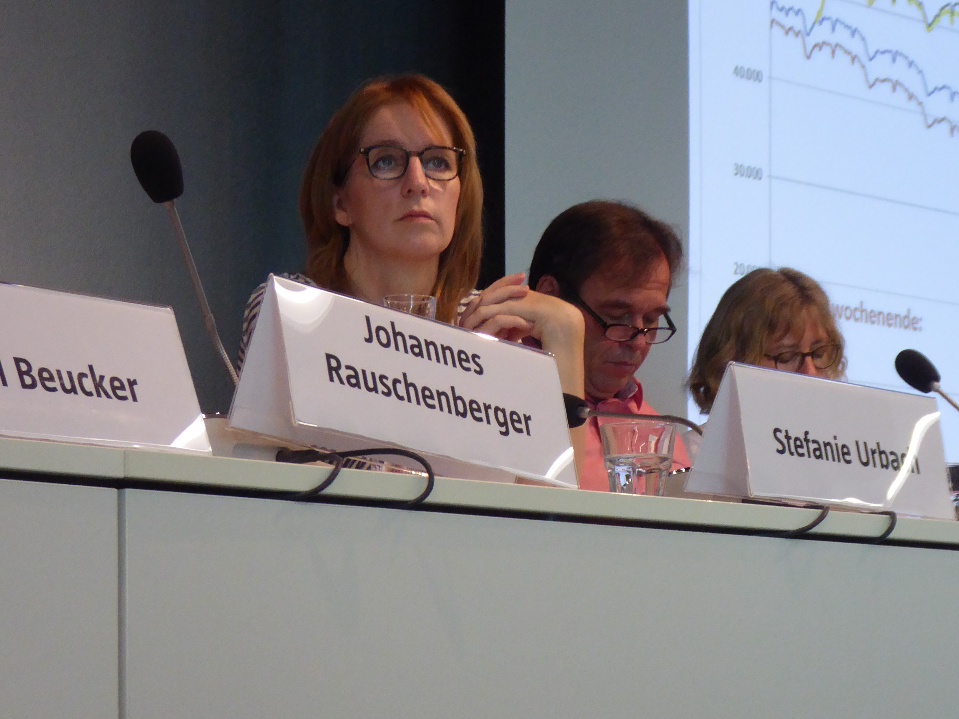 Stefanie Urbach (* 6. August 1971) ist eine deutsche Kinderbuchautorin, Konzeptionerin, Texterin und Beraterin. (Foto: 2018 während der Generalversammlung der taz-Genossenschaft)